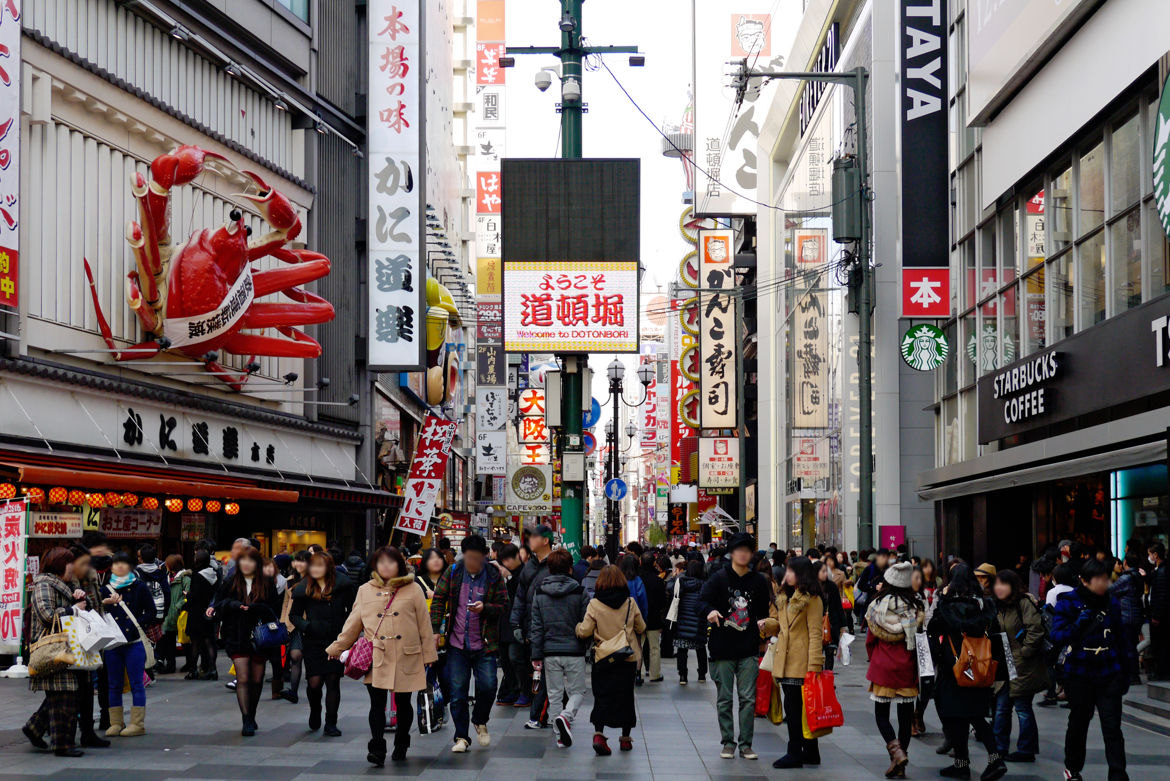 Dotonbori (道頓堀), Osaka, Osaka prefecture, Japan